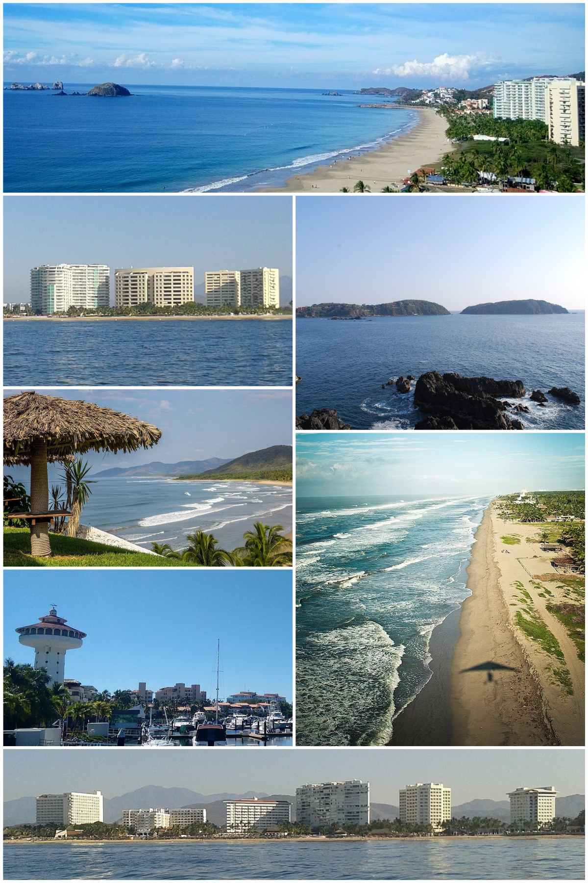 Ixtapa Zihuatanejo